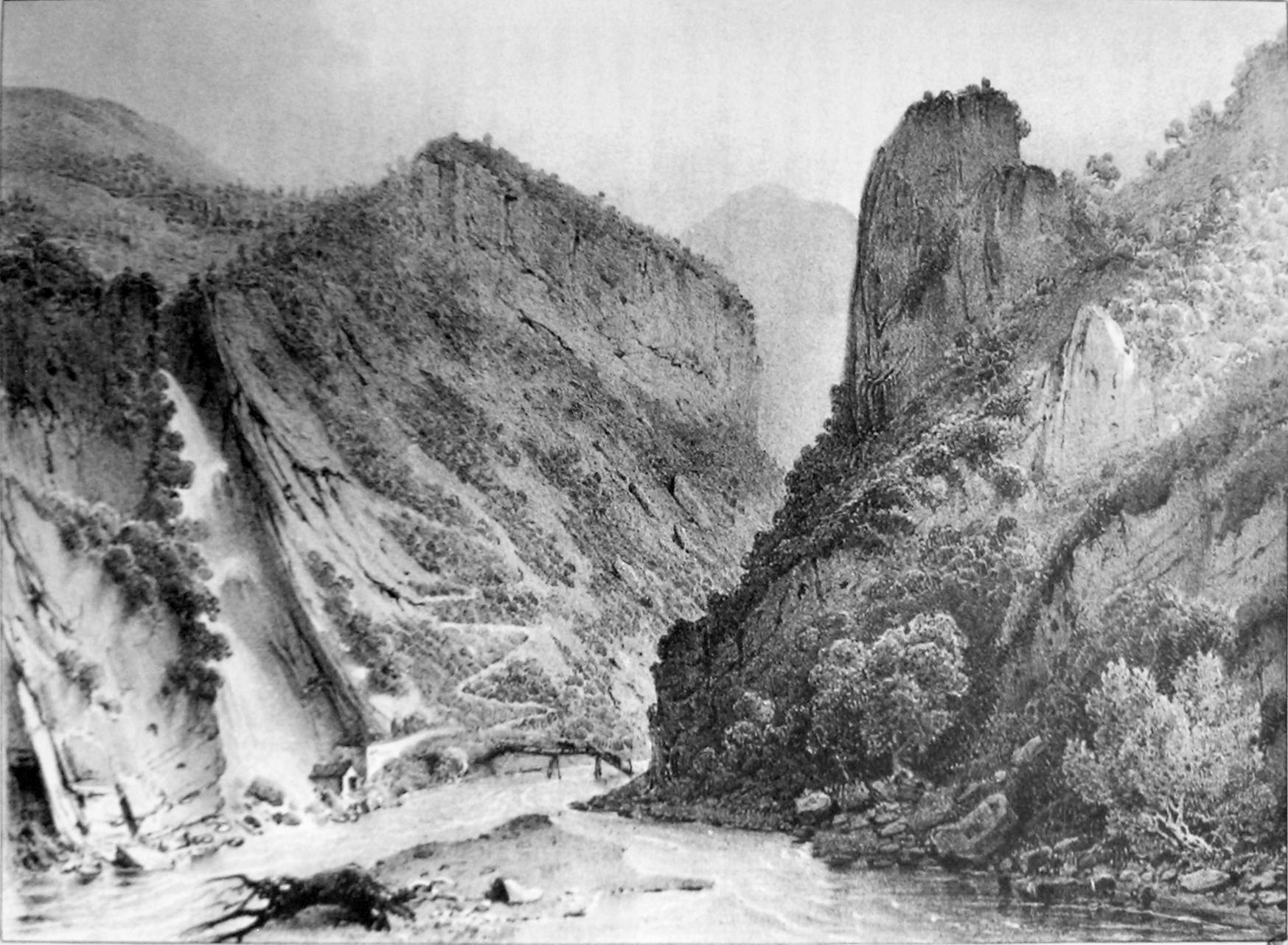 Sources thermales de la Motte ATTENTION ! Ce facsimilé est réalisé en applicant des alterations avec un logiciel graphique à une copie numérique, obtenue à partir d'une prise de photo faite par un non-professionnel. Elle pourrait ne pas être parfaitement réussie.